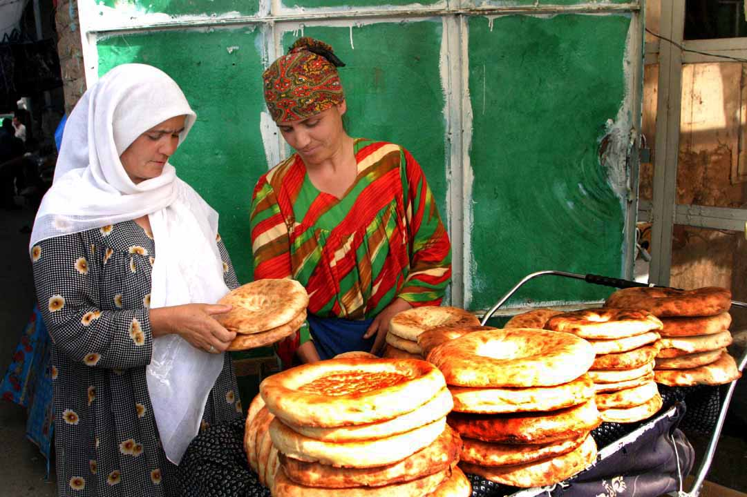 Tajikistan